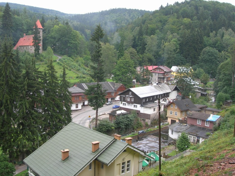 Widok na Międzygórze